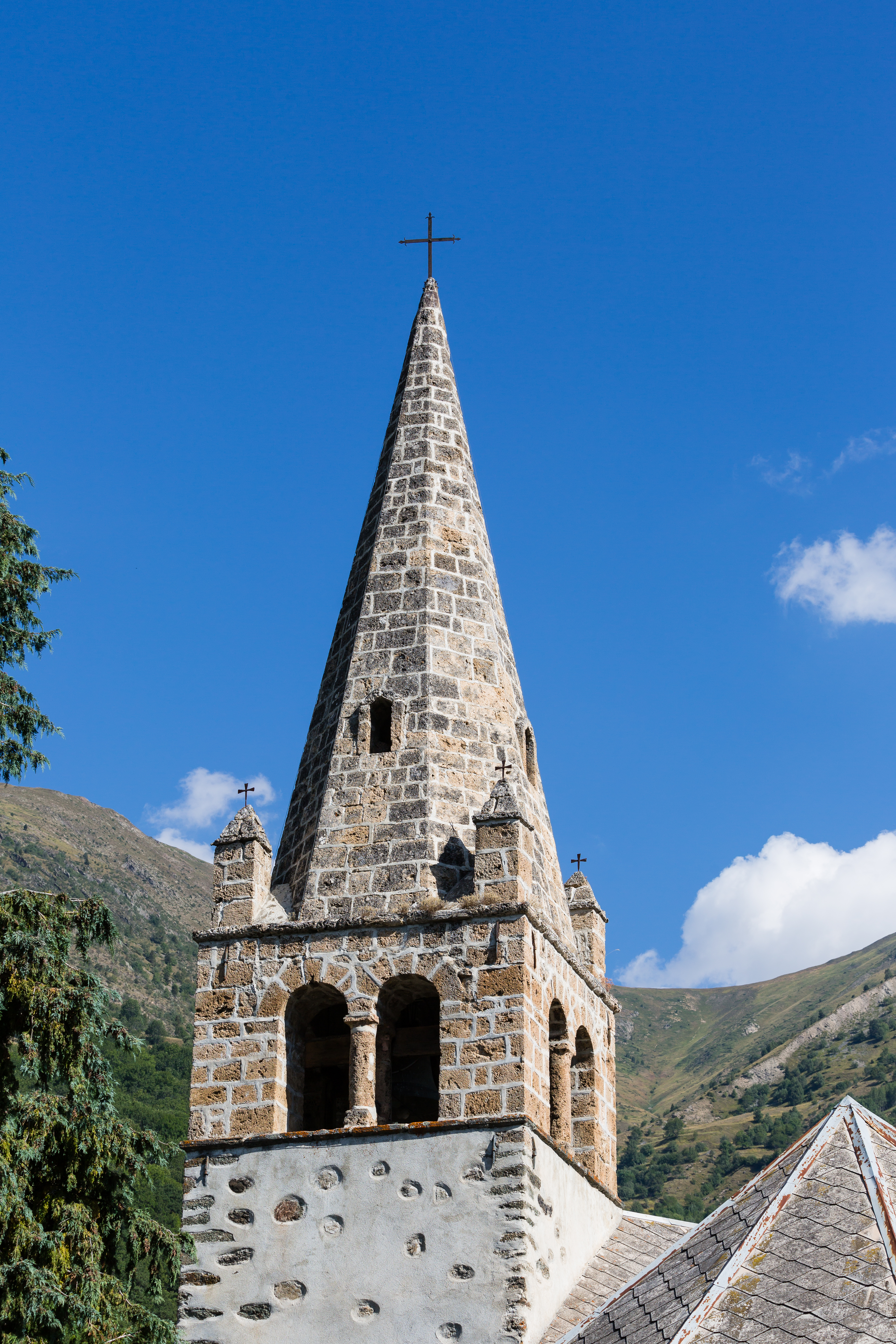 Clocher de l'église Saint-Arey du Freney-d'Oisans (France).